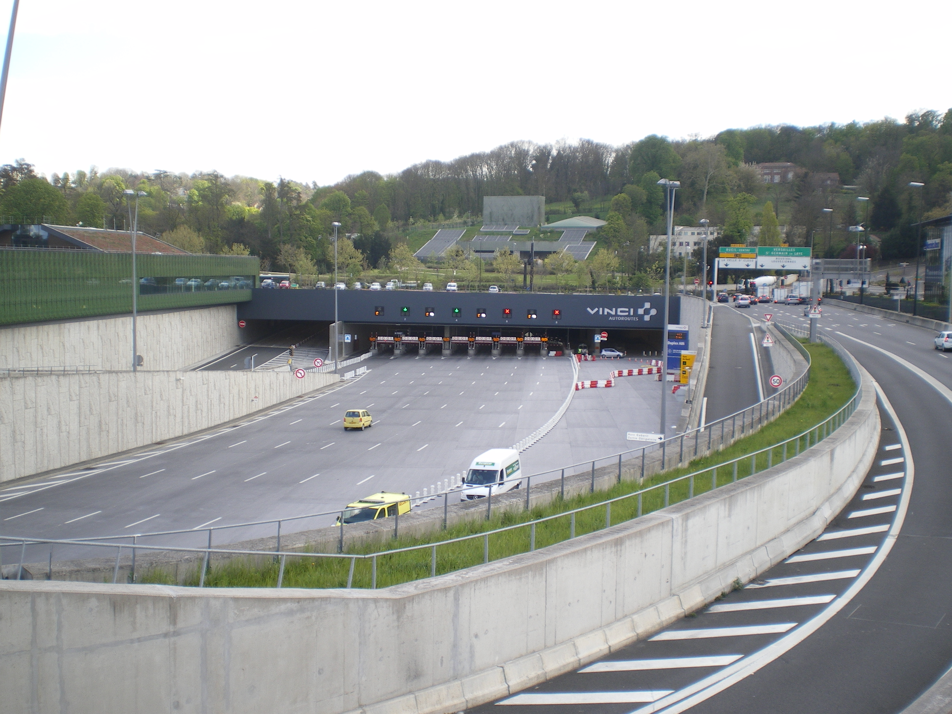 Barrieres de peage du duplex A86 a Rueil Malmaison